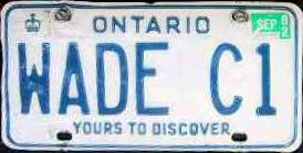 Ontario personalized Licence Plate 1980 series